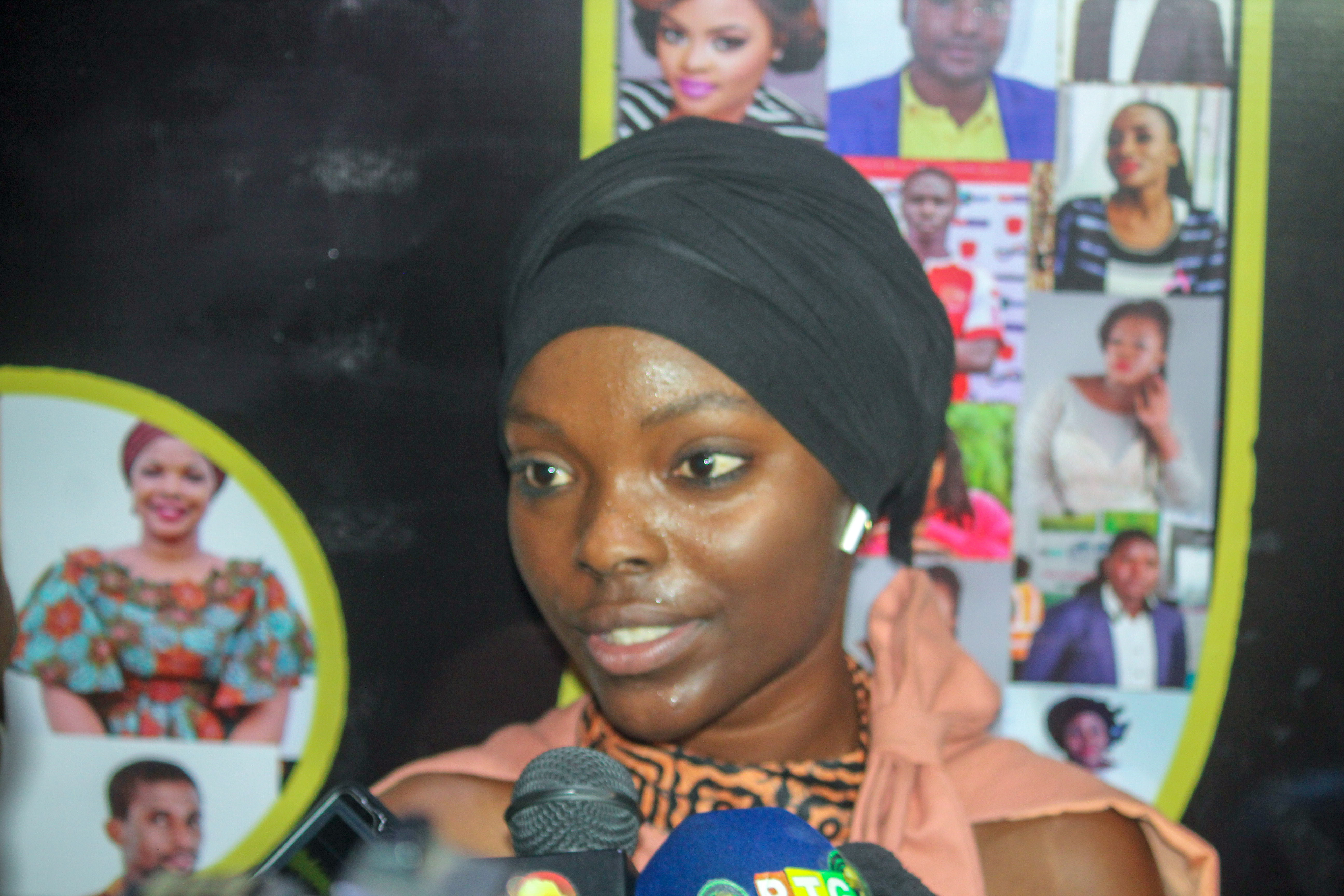 Hadja Idrissa Bah du Club des Jeunes Filles Leaders de Guinée au J Awards 2019